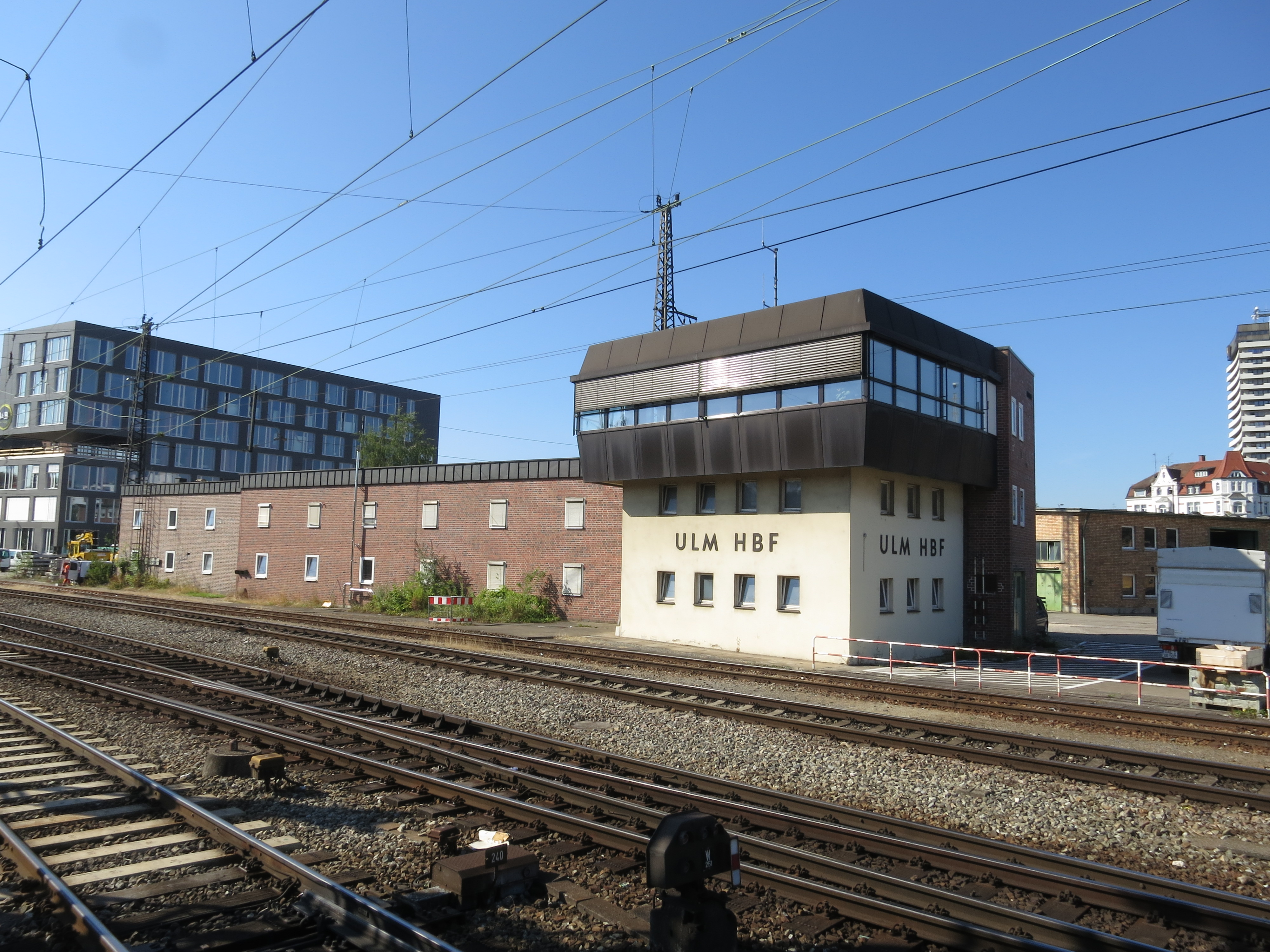 Zentralstellwerk des Ulmer Hauptbahnhofs